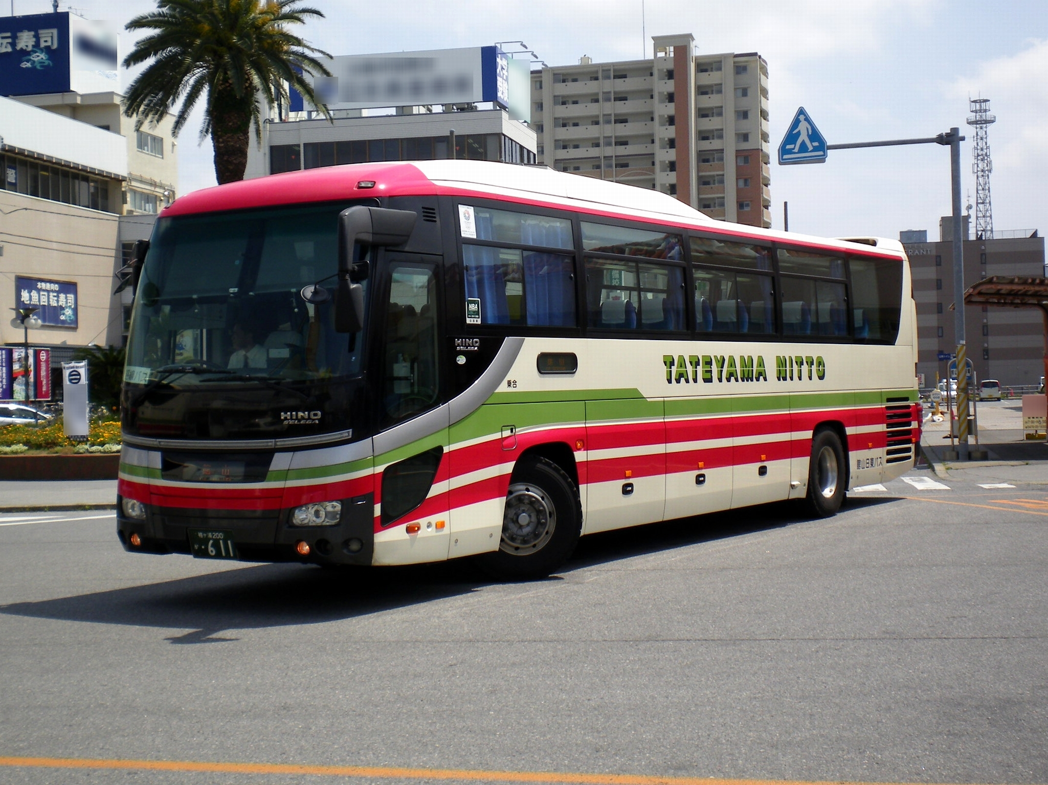 日野・セレガ 袖ケ浦200か611 千葉県館山市・JR館山駅前にて投稿者本人が撮影。